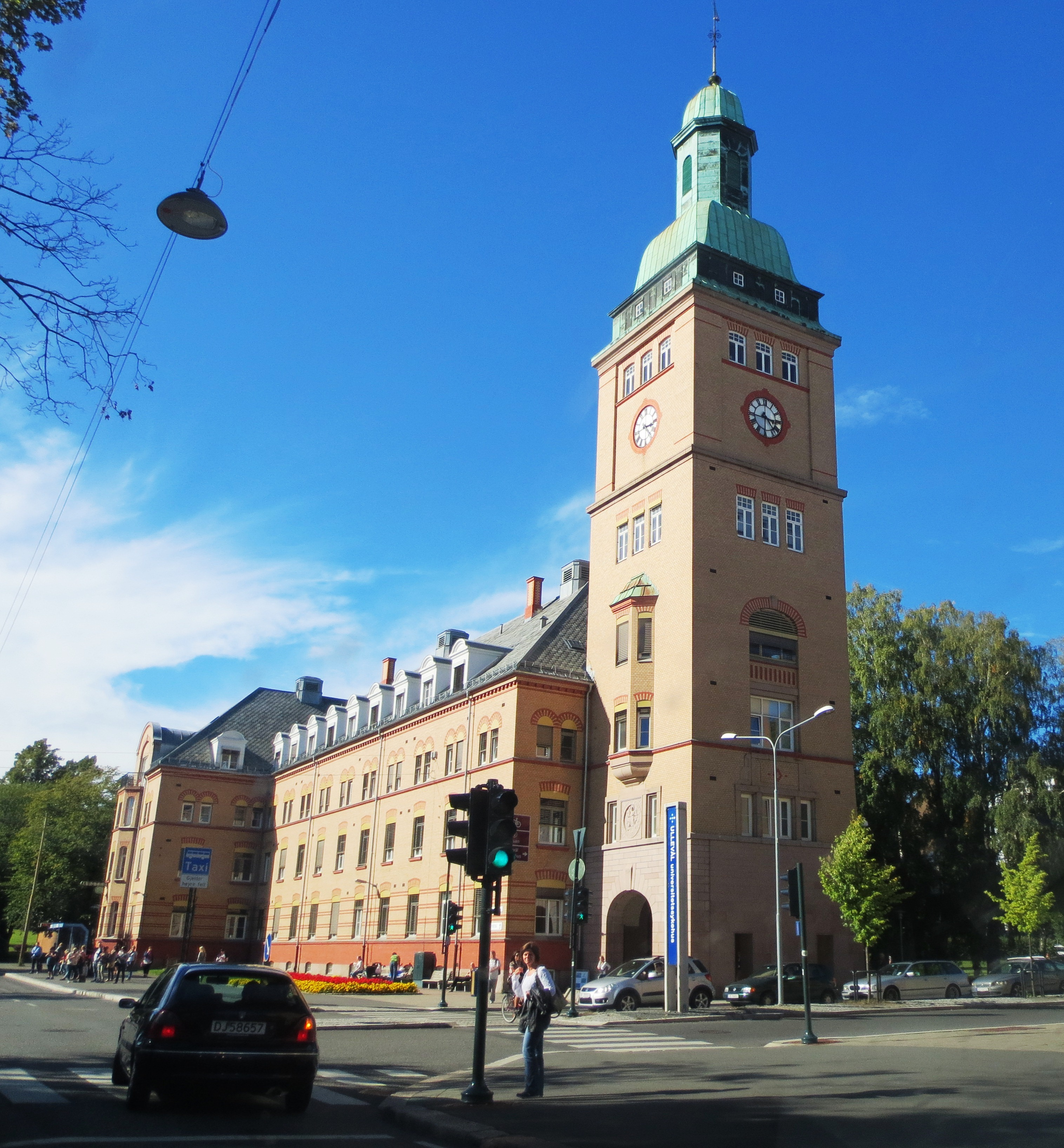 Lokalt vernet bygningsminne på Ullevål, Oslo